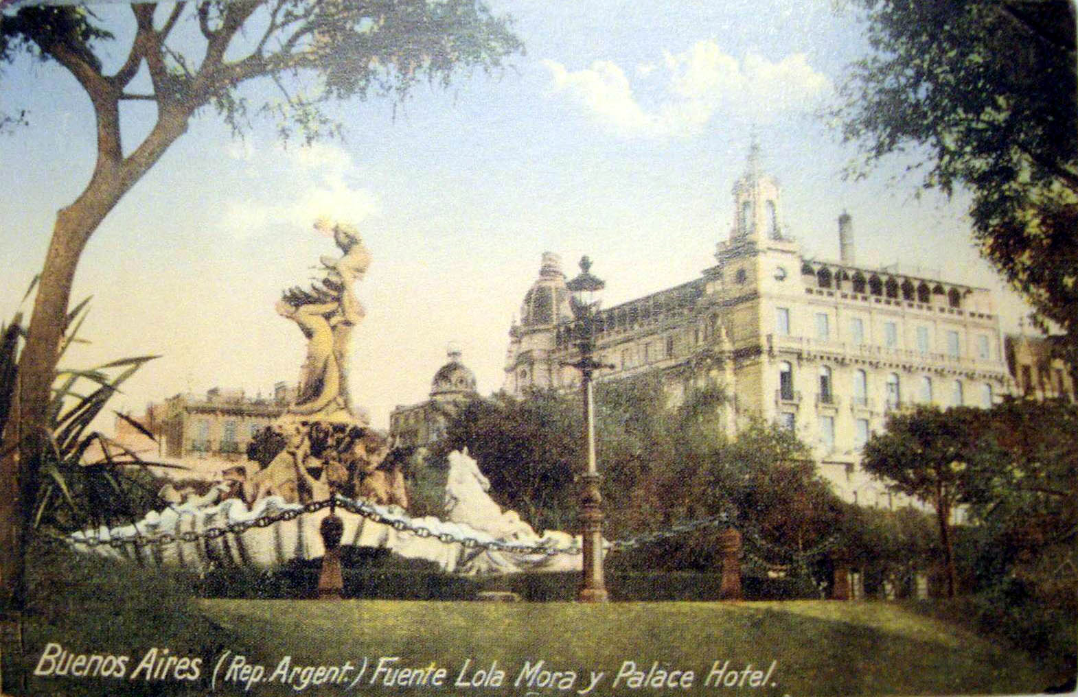 Postal coloreada de la Fuente de las Nereidas en su ubicación original, en la plaza ubicada en el Paseo de Julio (hoy Leandro N. Alem) y Cangallo (hoy Tte. Gral. Juan D. Perón). Enfrente, el Palace Hotel de Nicolás Mihanovich, actual laboratorio de idiomas de la Facultad de Filosofía y Letras de la UBA. Al fondo, la cúpula del edificio La Bola de Nieve, del arquitecto Eduardo Le Monnier.